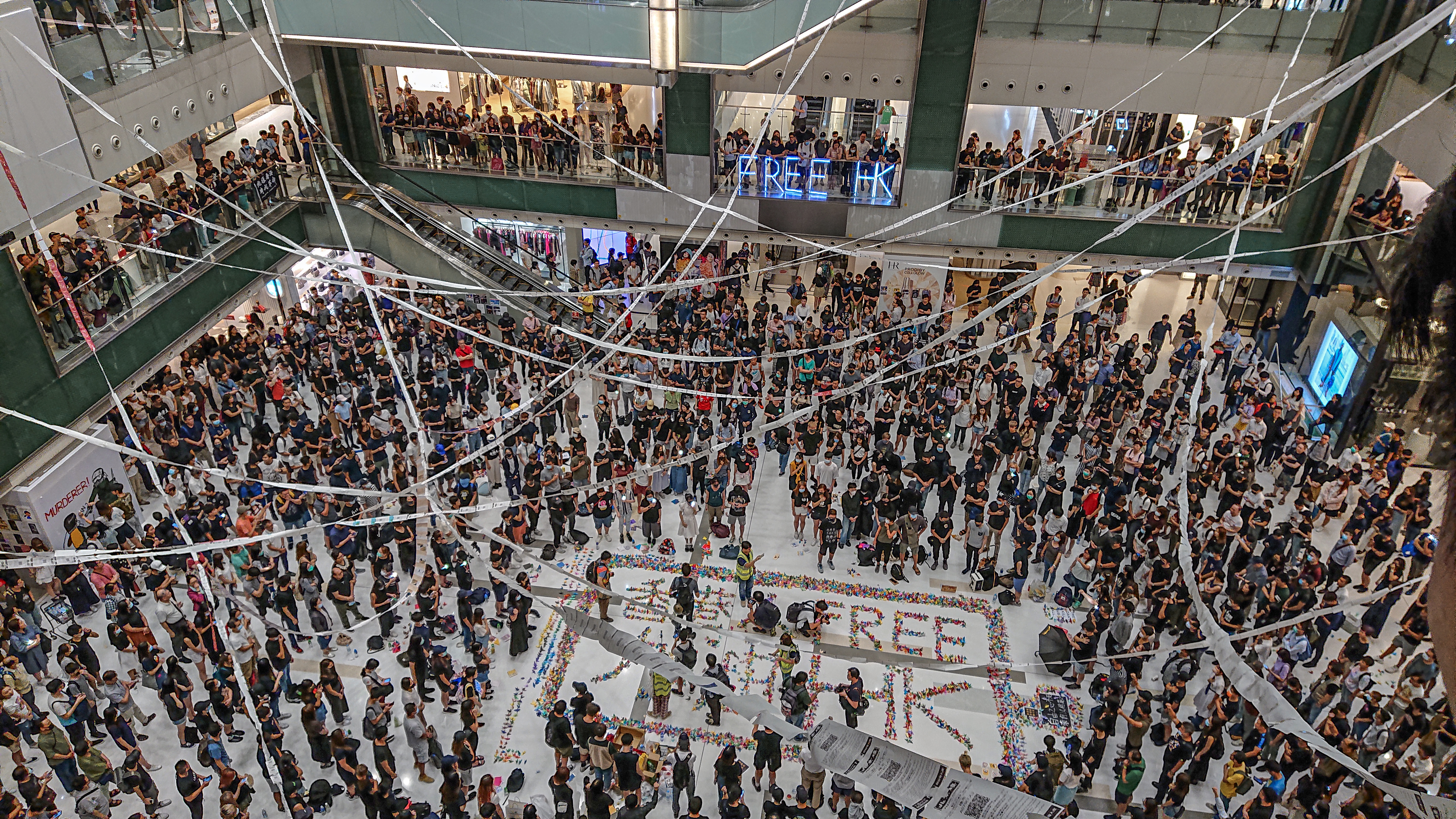 Free Hong Kong